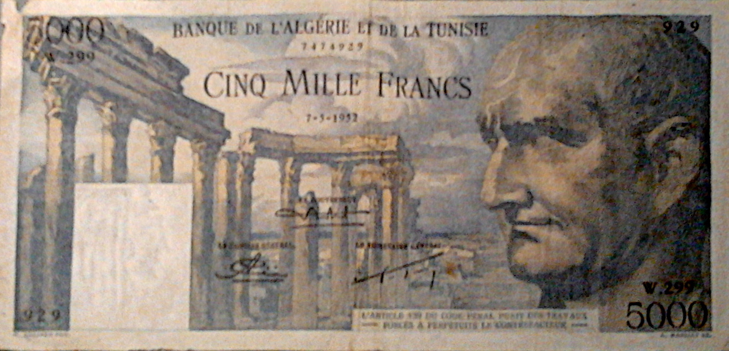 Billet de 5 000 Francs de 1952, Musée de la monnaie - Banque centrale tunisienne - Avenue Mohammed V - Tunis - Vitrine 12 (Royaume Tunisien sous le protectorat de la France)